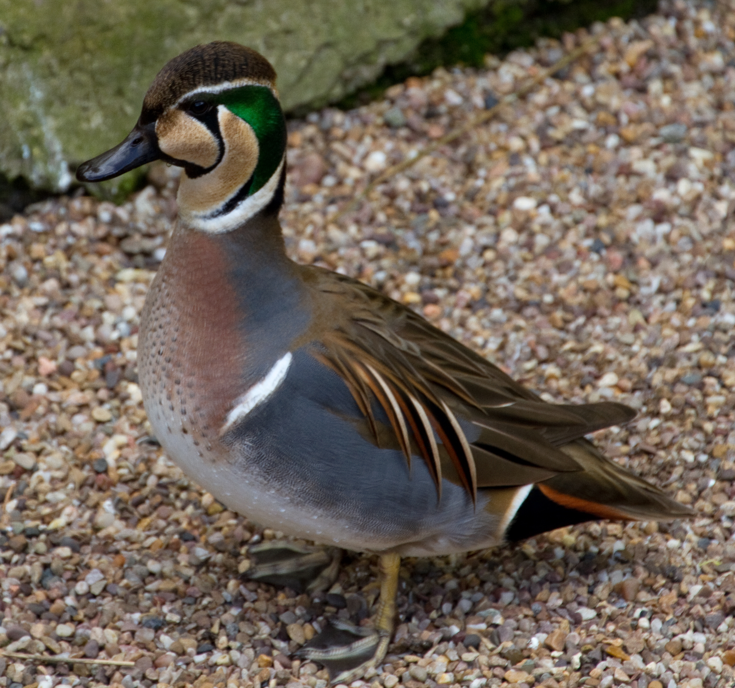 Duck 3d